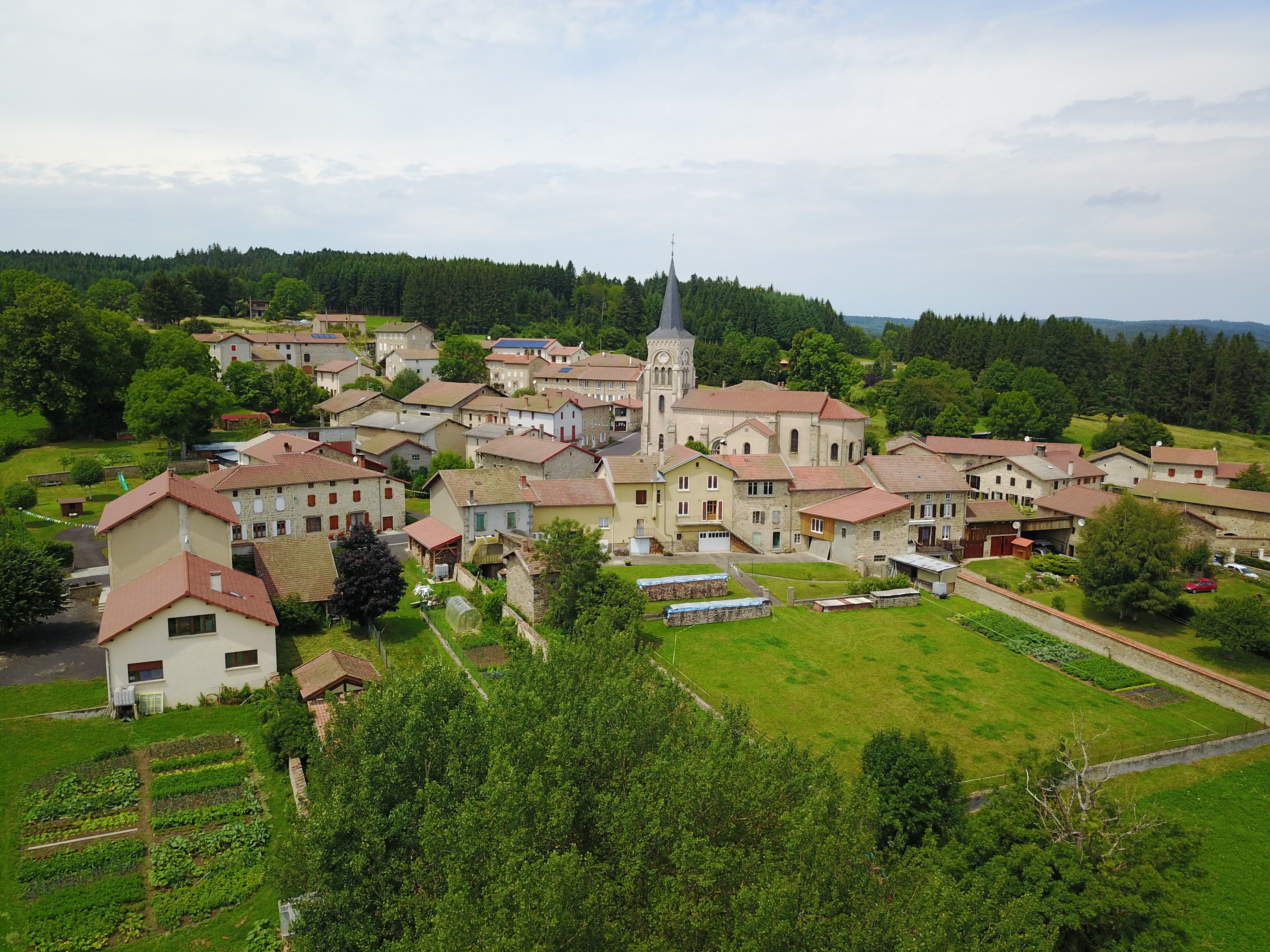 Le bourg du village